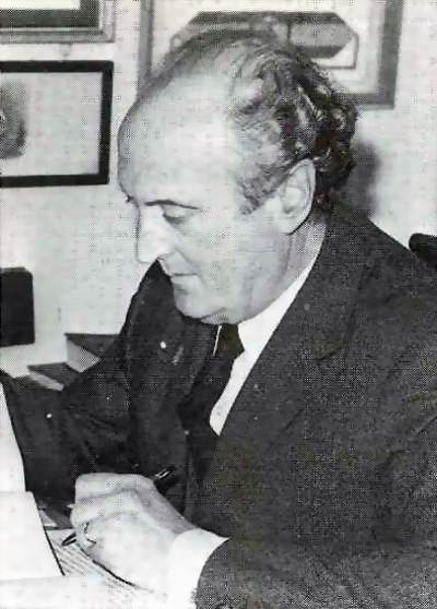 Luis B. Lluch Garín (1907-1986) [Modificada de la solapilla de la contraportada de su obra "Ermitas y paisajes de Valencia" (1980)].